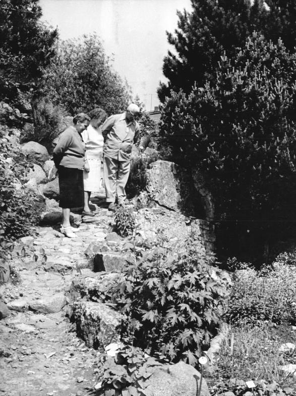 Rostock, Botanischer Garten Zentralbild Burmeister 25.6.1962 Zur Vorbereitung der Ostseewoche Der Botanische Garten der Universität Rostock ist das ganze Jahr hindurch ein beliebtes Ausflugsziel der Rostocker Bevölkerung und ihrer Gäste. Tausende Blumen, Pflanzen, Ziersträucher und Bäume bezaubern mit ihrer Farbenpracht jeden Besucher. Vom Edelweiß der Alpen bis zu den einheimischen Gräsern; von tropischen Gewächsen bis zu den Pflanzen des hohen Nordens ist hier alles zu finden. Auf rund 120.000 Quadratmetern haben die Mitarbeiter des Gartens alle Hände voll zu tun, um die Anlagen in Stand zu halten und Neuanlagen fertigzustellen. UBz: Interessierte Besucher in den herrlichen Anlagen des Botanischen Gartens.